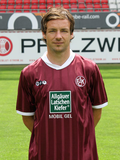 Danny Fuchs, Fußballspieler